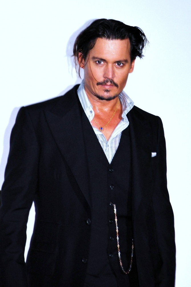 Johnny Depp à l'avant-première de Public enemies à Paris